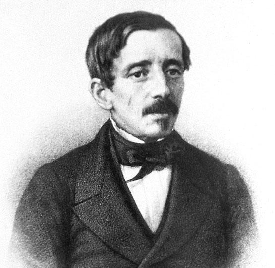 Felipe Pardo y Aliaga (Lima 1806-1868) Poeta satírico, dramaturgo, abogado y político peruano. Representante del costumbrismo.